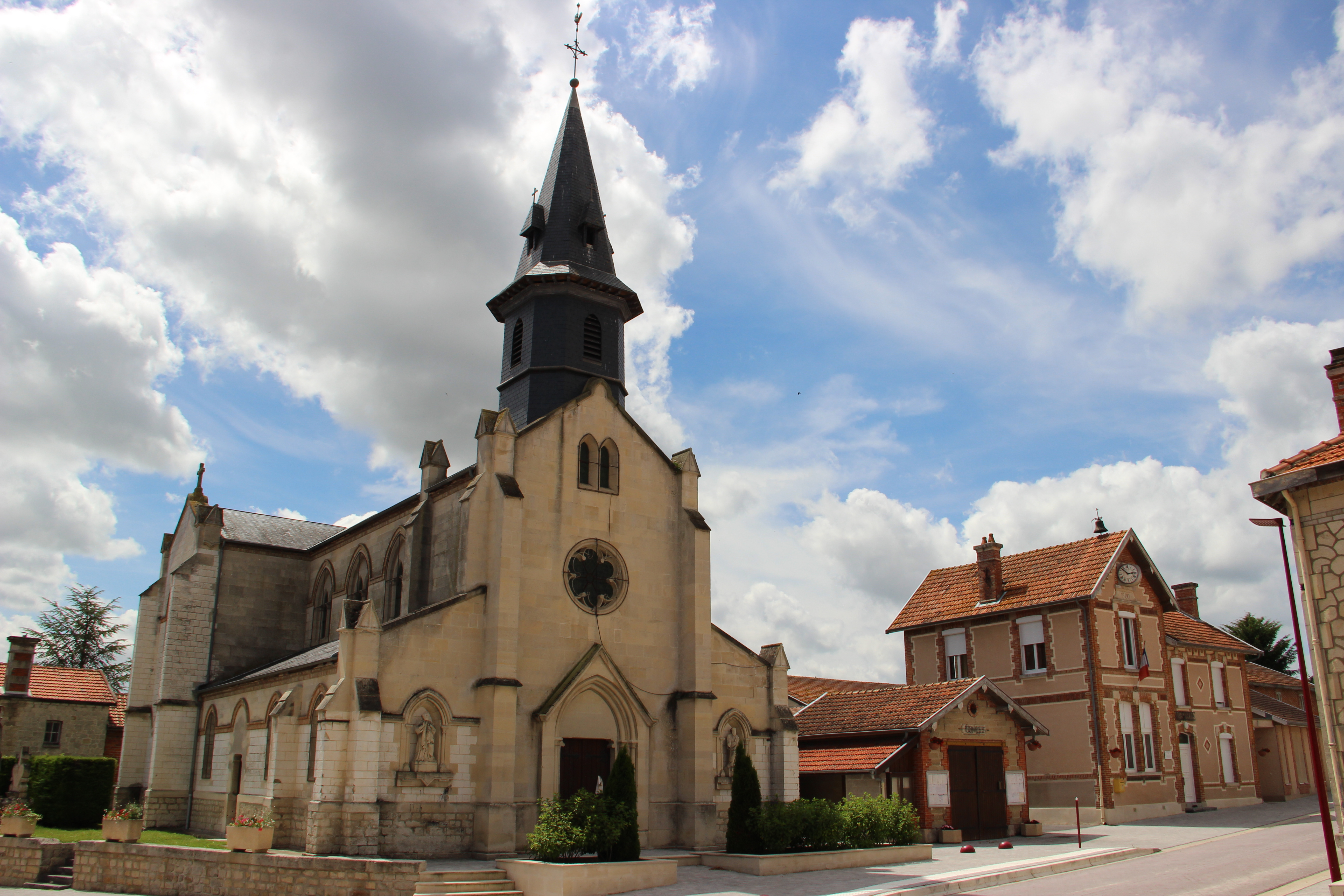 Eglise et mairie de Lisse en Champagne